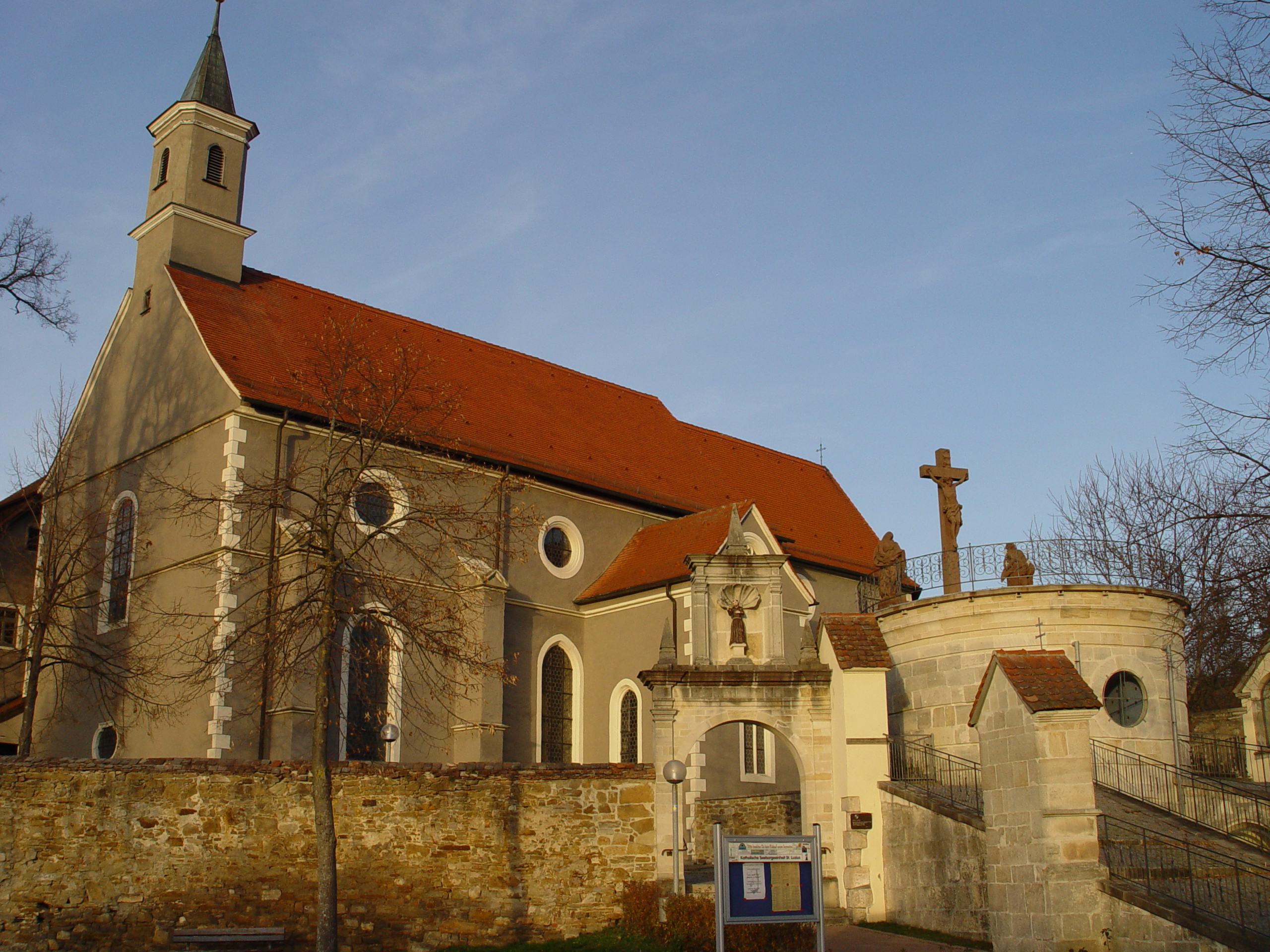 Kirche St. Luzen in Hechingen mit Kalvarienberg Bild gemacht am 27.11.2006 own work - Bild selbst gemacht Photographed by: Zollernalb